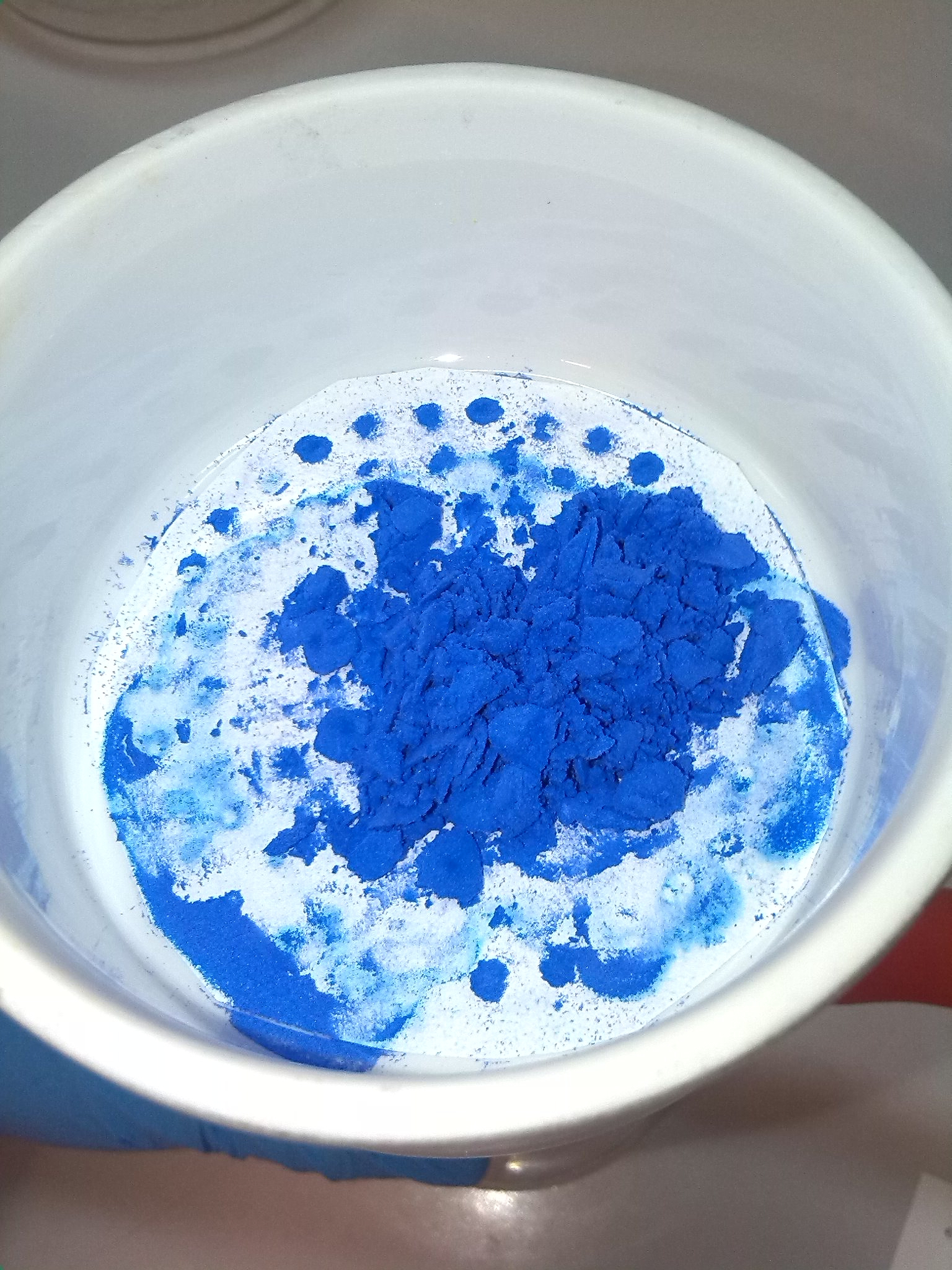 Así queda el Sulfato de tetraamín cobre (II) tras hacer una filtración a vacío empleando etanol y éter dimetílico para acelerar el proceso de secado. Se ha despegado con una cucharilla, de forma que se ve mejor su textura arenosa. El secado ha sido rápido, así que es difícil ver los cristales formados a simple vista.